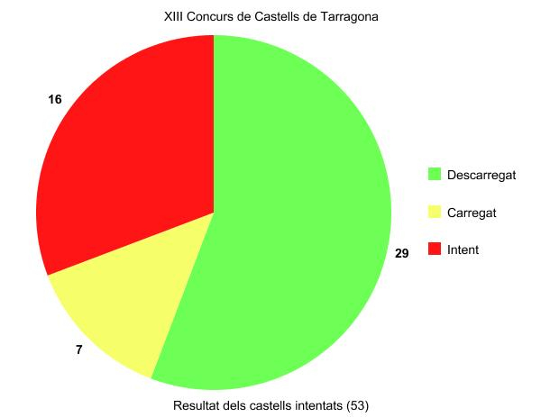 Intents del concurs